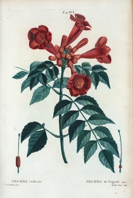 Tecoma radicans = Tecoma de Virginie.